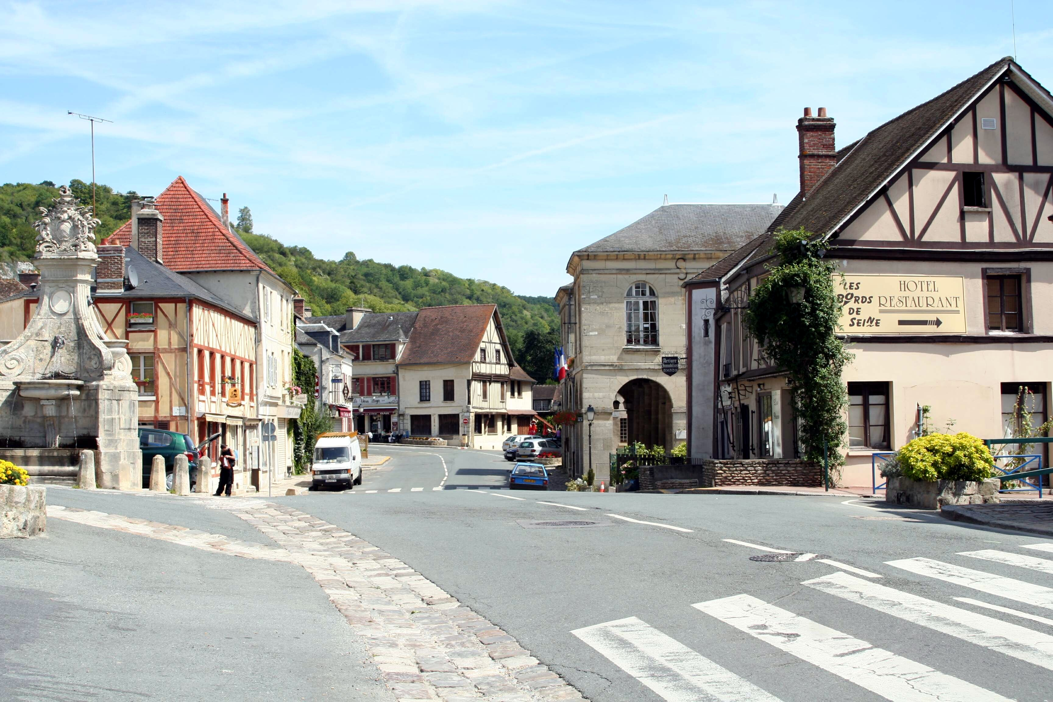 Rue principale, la Roche-Guyon, Val-d'Oise (France)